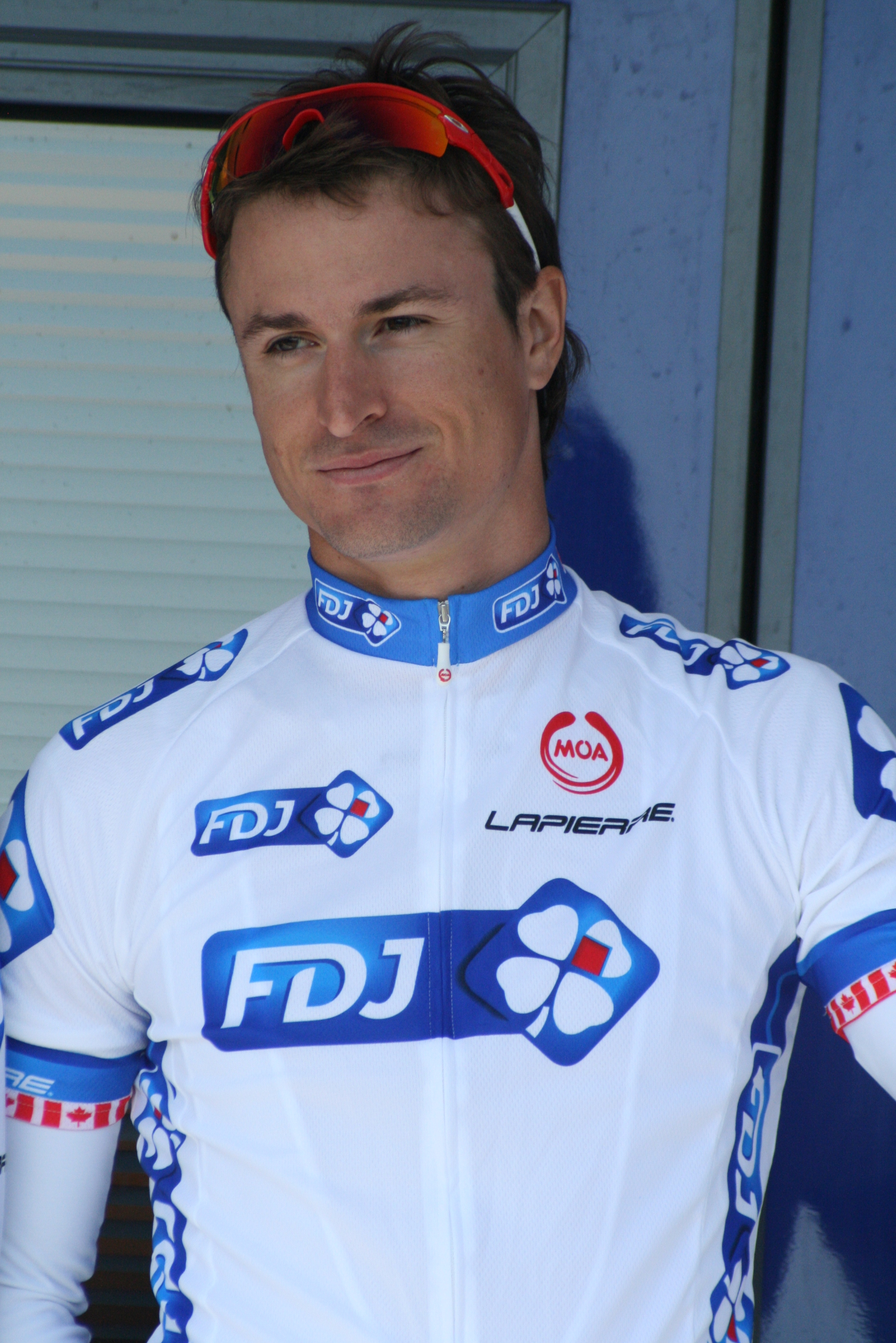 Présentation des coureurs au départ de la première étape Dominique Rollin